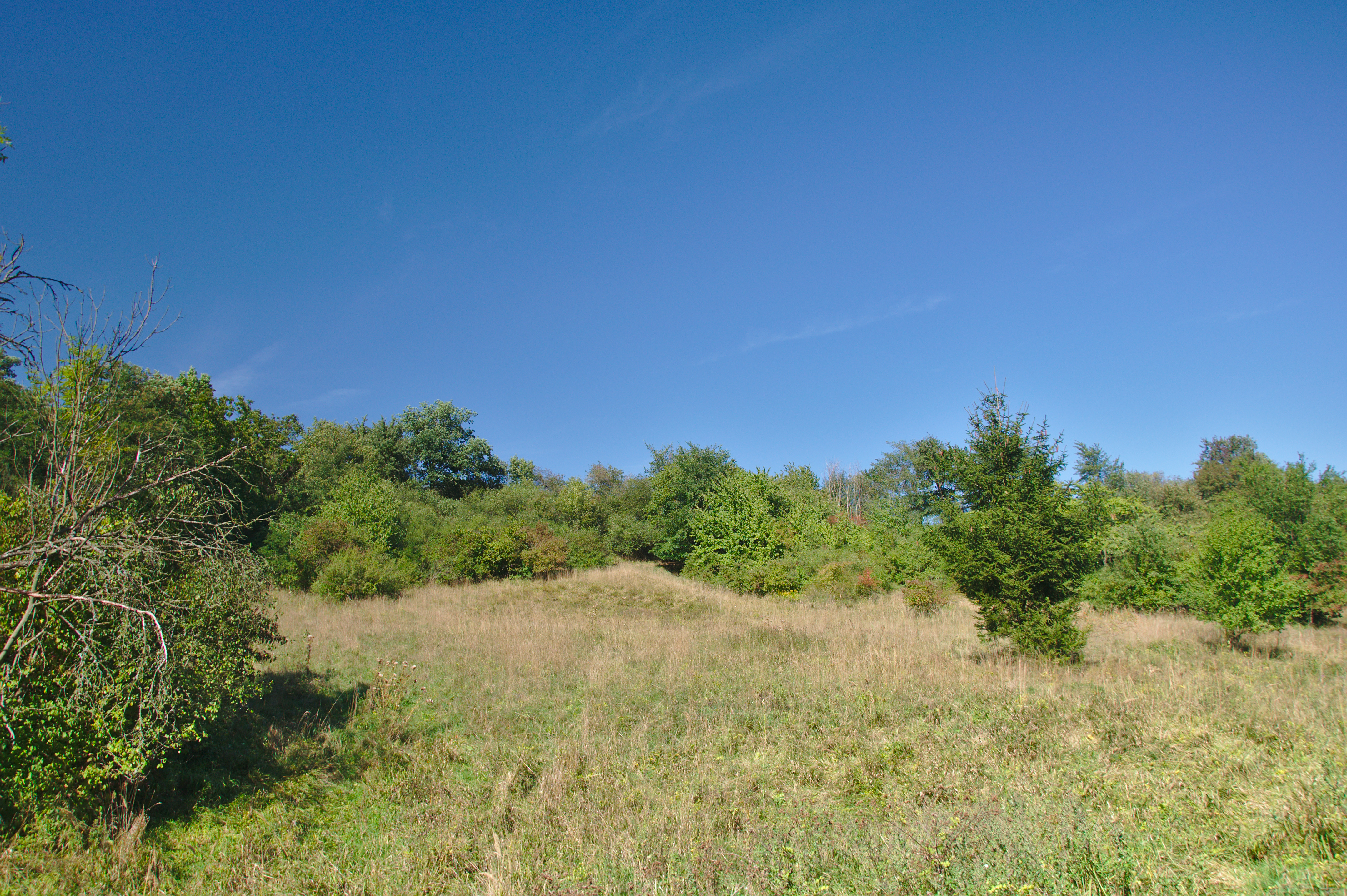 Přírodní památka Brus, okres Prostějov